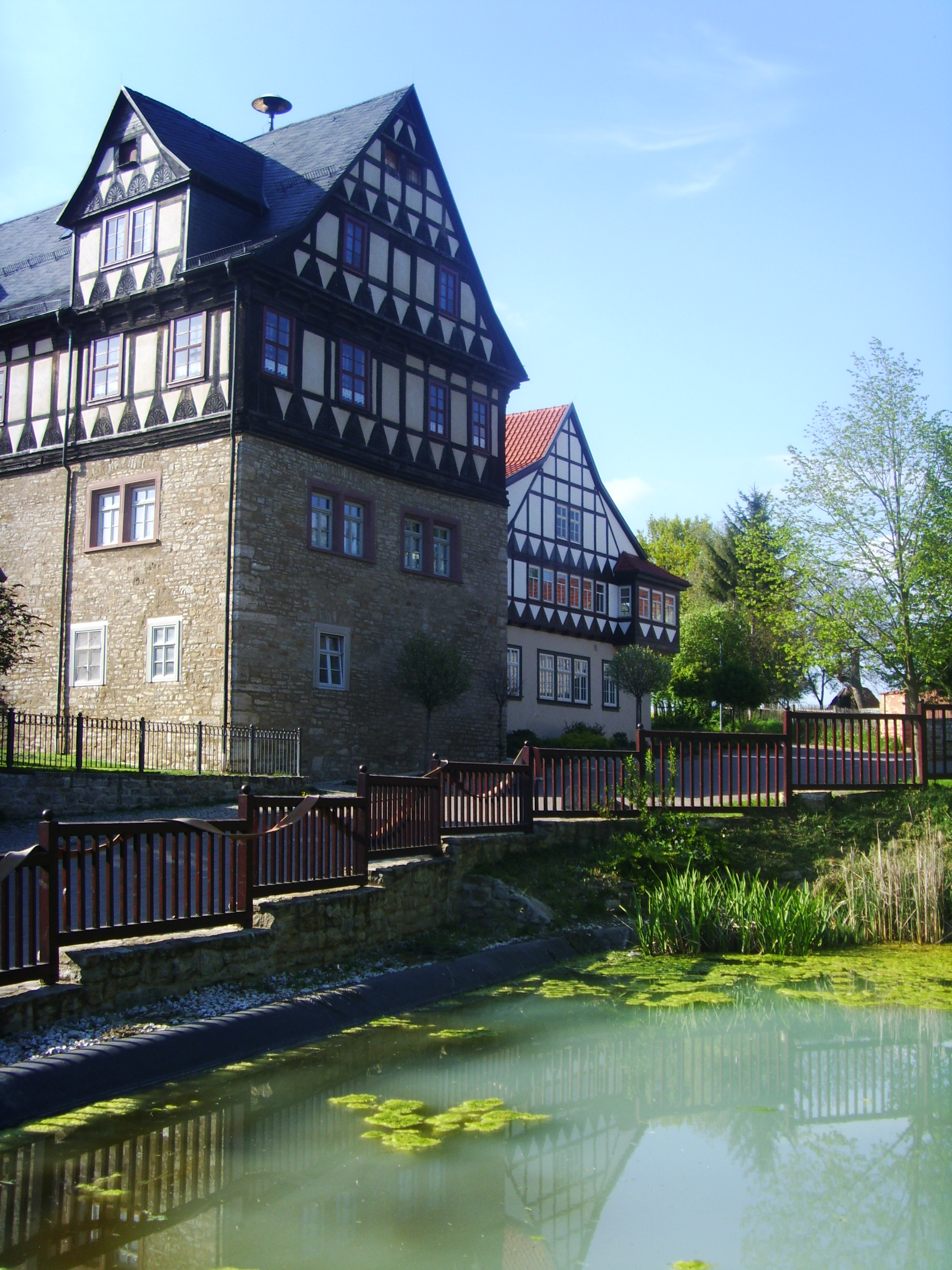 Das Bild zeigt den Edelhof in Mittelsömmern (Stephan Heinemann, Bild selbst erstellt, 07.05.2008).